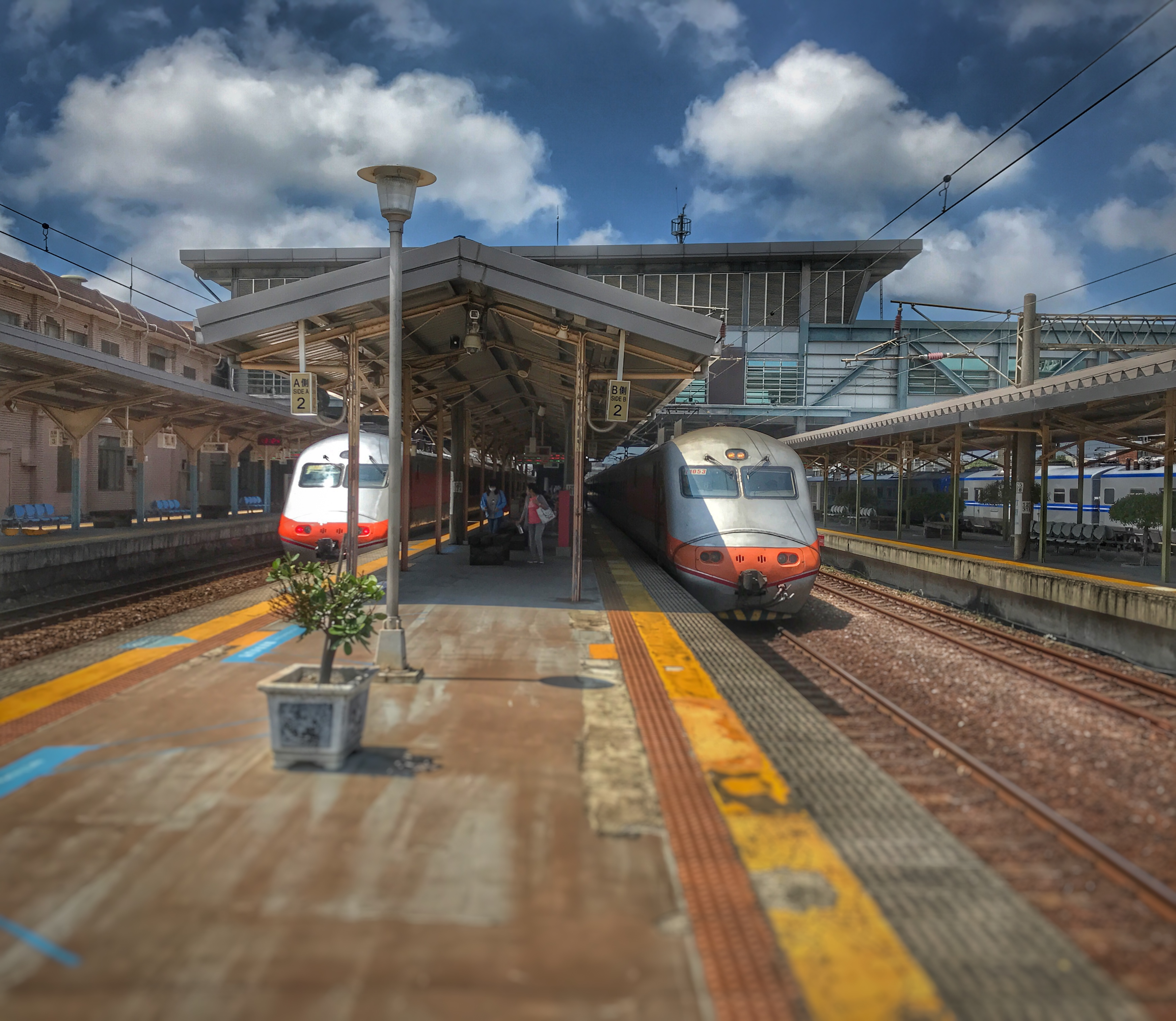 臺灣鐵路管理局推拉式自強號停靠竹南車站